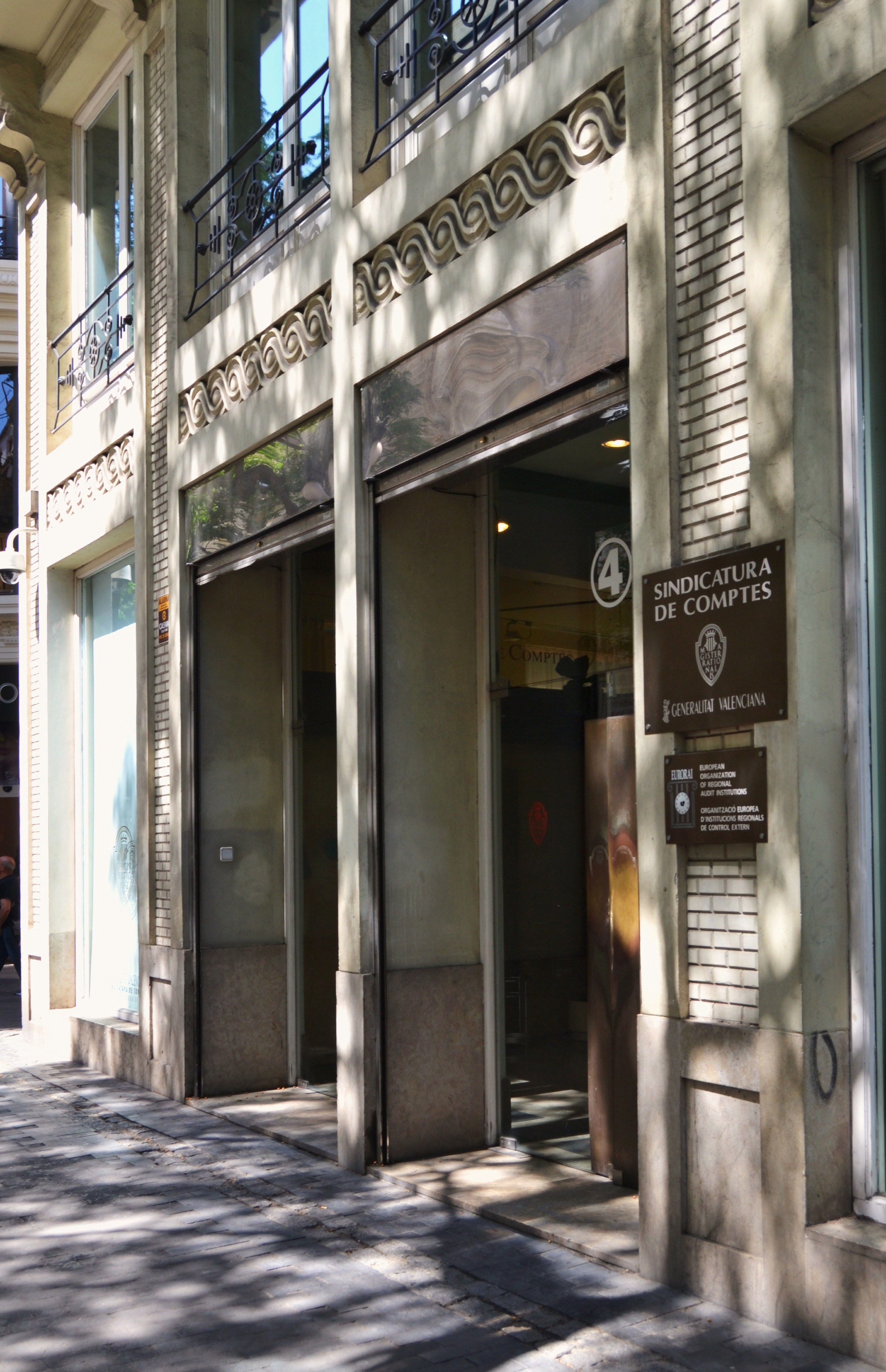 Portes de la Sindicatura de Comptes del País Valencià, al carrer de sant Vicent Màrtir de València.